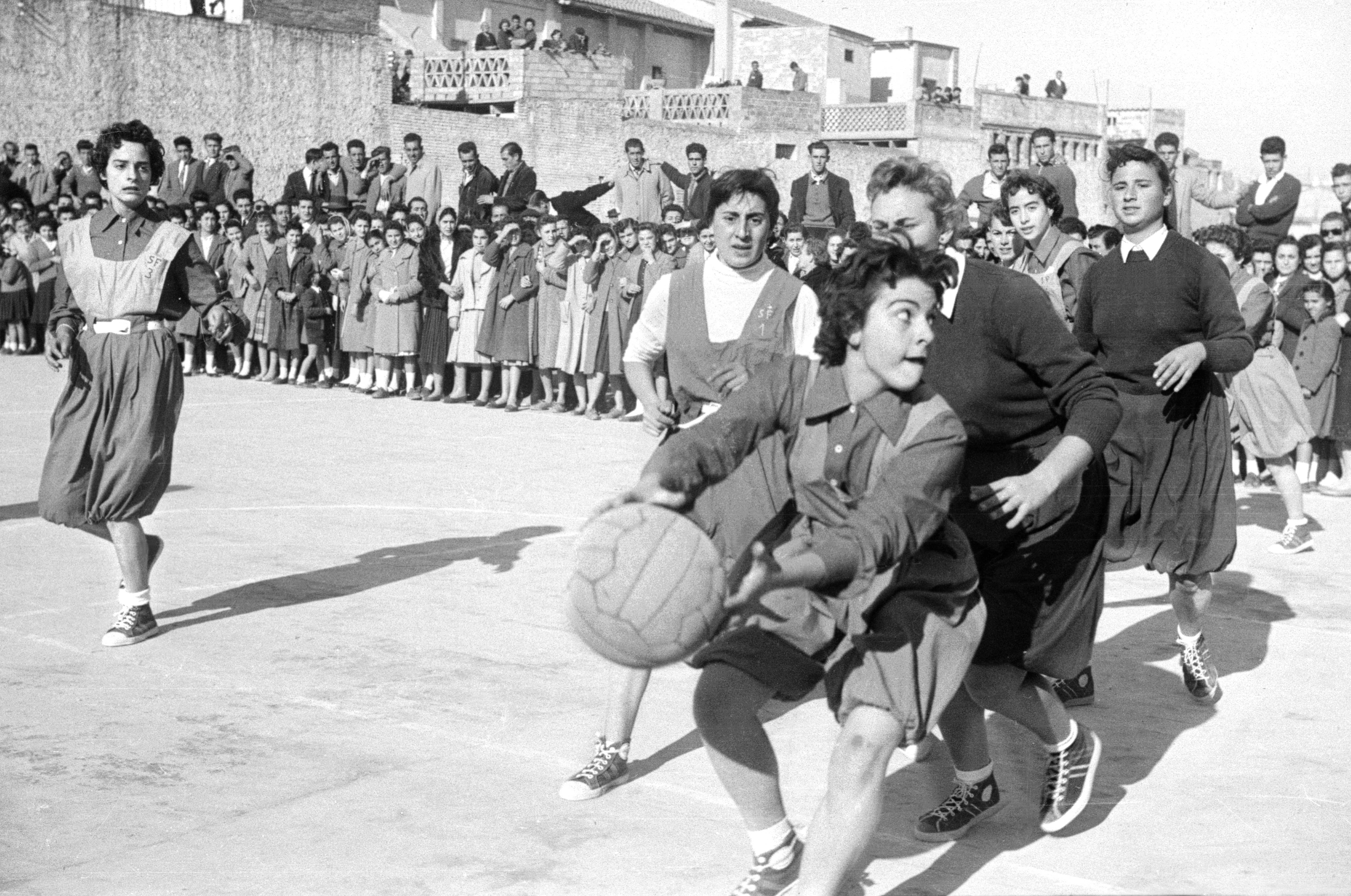 Fotografia d'Ismael Latorre Mendoza. Data: 01-01-1958 Podrem gaudir d'aquesta imatge aquest any 2017 també en Aljannat VI dedicat als esports de l'ajuntament d'Alginet. 32 fotos de l'arxiu seran editades segons el contracte del 28 de març de 2017 entre l'Arxiu i l'Ajuntament d'Alginet. Dos imatges de l'Arxiu de basquetbol femení, amb data 11-03-1956, s'hi van publicar en: Fornés, Alberto; Císcar, José i Latorre, Ismael: Alginet, històries, costums i altres relats, Societat Cultural Alèdua, Alginet, 2003. Dipòsit Legal: V-2546-2003; pàgina 159. Aquesta imatge també va ser editada a: VVAA: La Muerte de la Libertad. Represión franquista al moviniento libertario. Edita CGT. Col·labora Fundació Salvador Seguí. 2a. edició, amb cura de L'Eixam Edicions; 2009. ISBN 978-84-96014-90-9 Dipòsit Legal: V-3523-2009. Pàgina 72. Tractament digital: Carolina Latorre Canet.